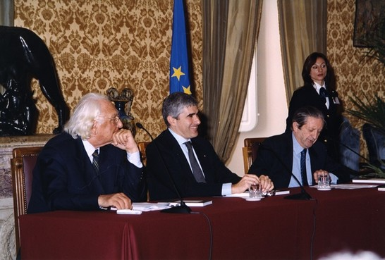 Presentazione del volume "Inventario del Fondo Mario Pannunzio"